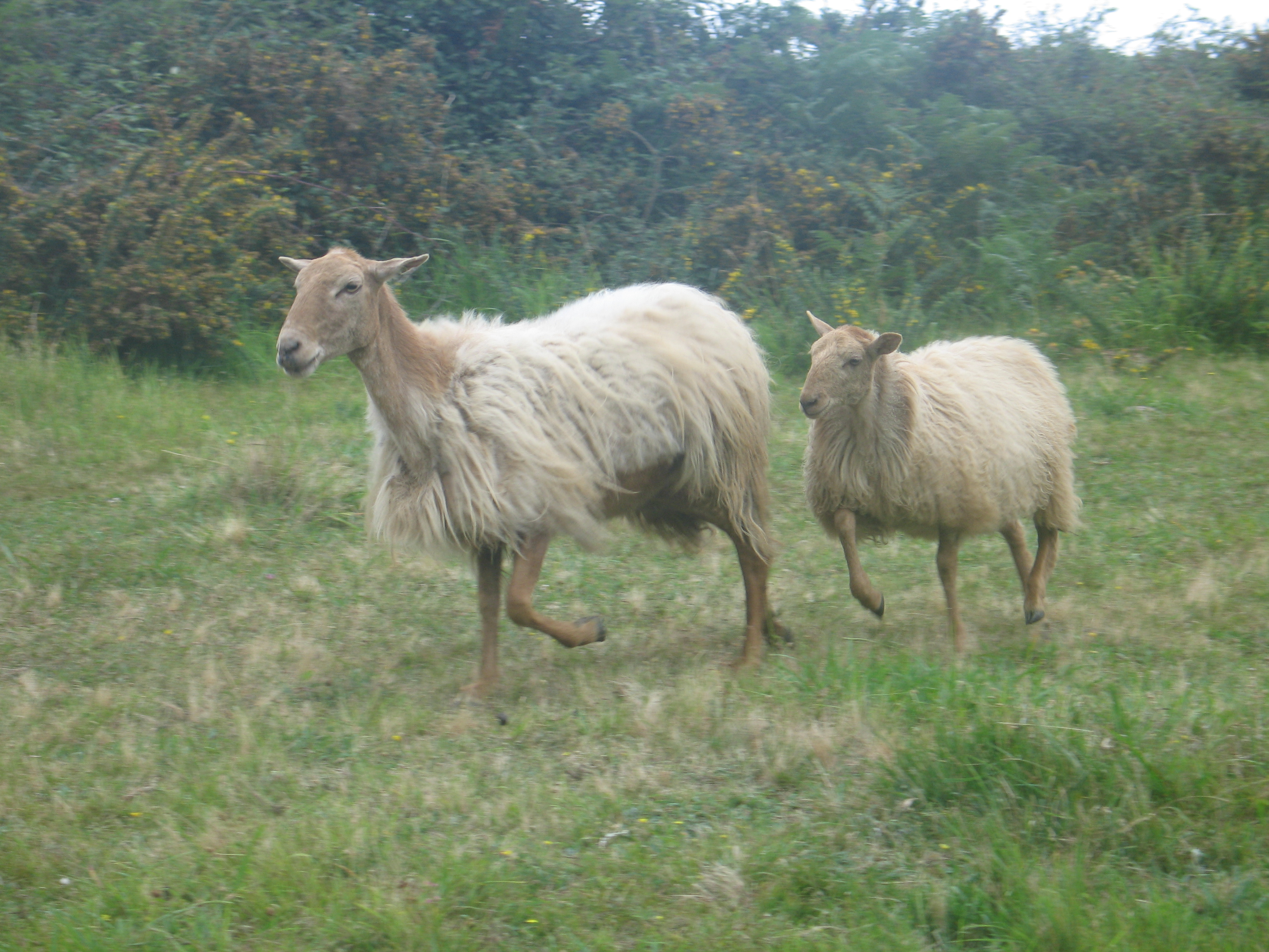 Sasardiak Gipuzkoako Punta Mendatan.